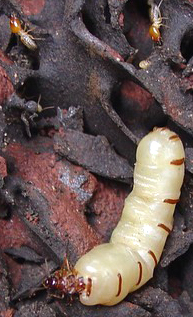 Foto da Rainha de um cupinzeiro. Autor: Márcio Roberto Pinto Mafra